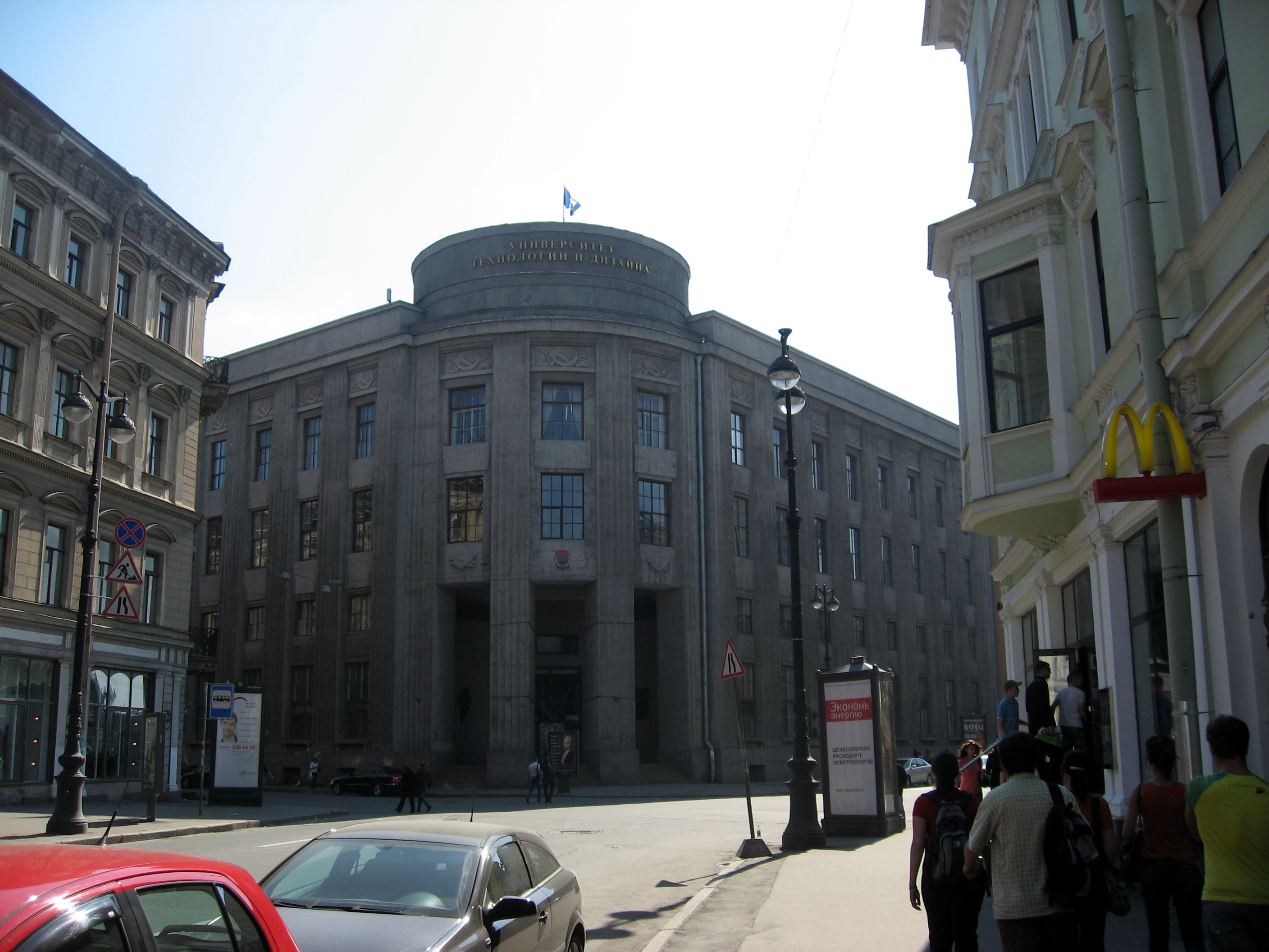 Sankt-Petěrburg